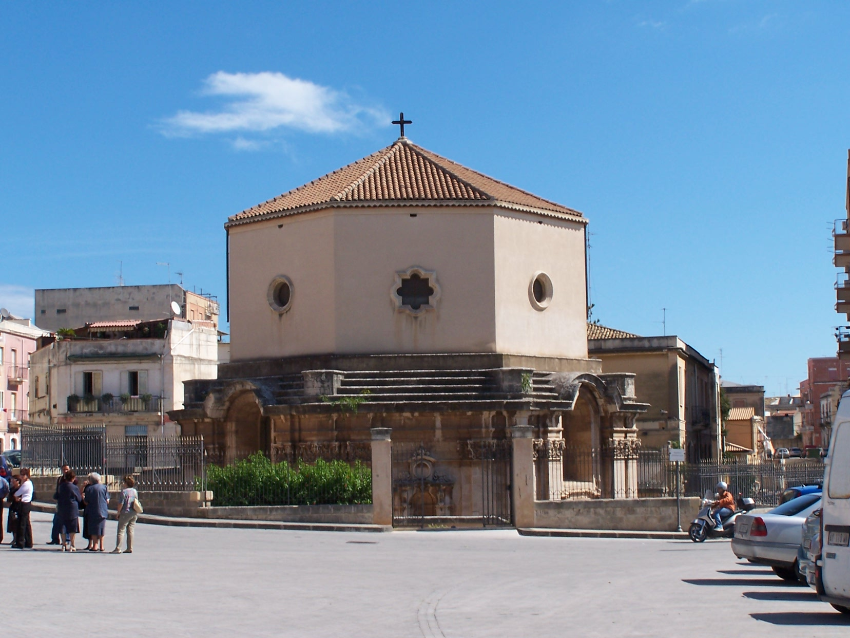 La Rotonda di Santa Lucia a Siracusa, costruita sul luogo del sepolcro di Santa Lucia, accanto alla chiesa di Santa Lucia al Sepolcro.